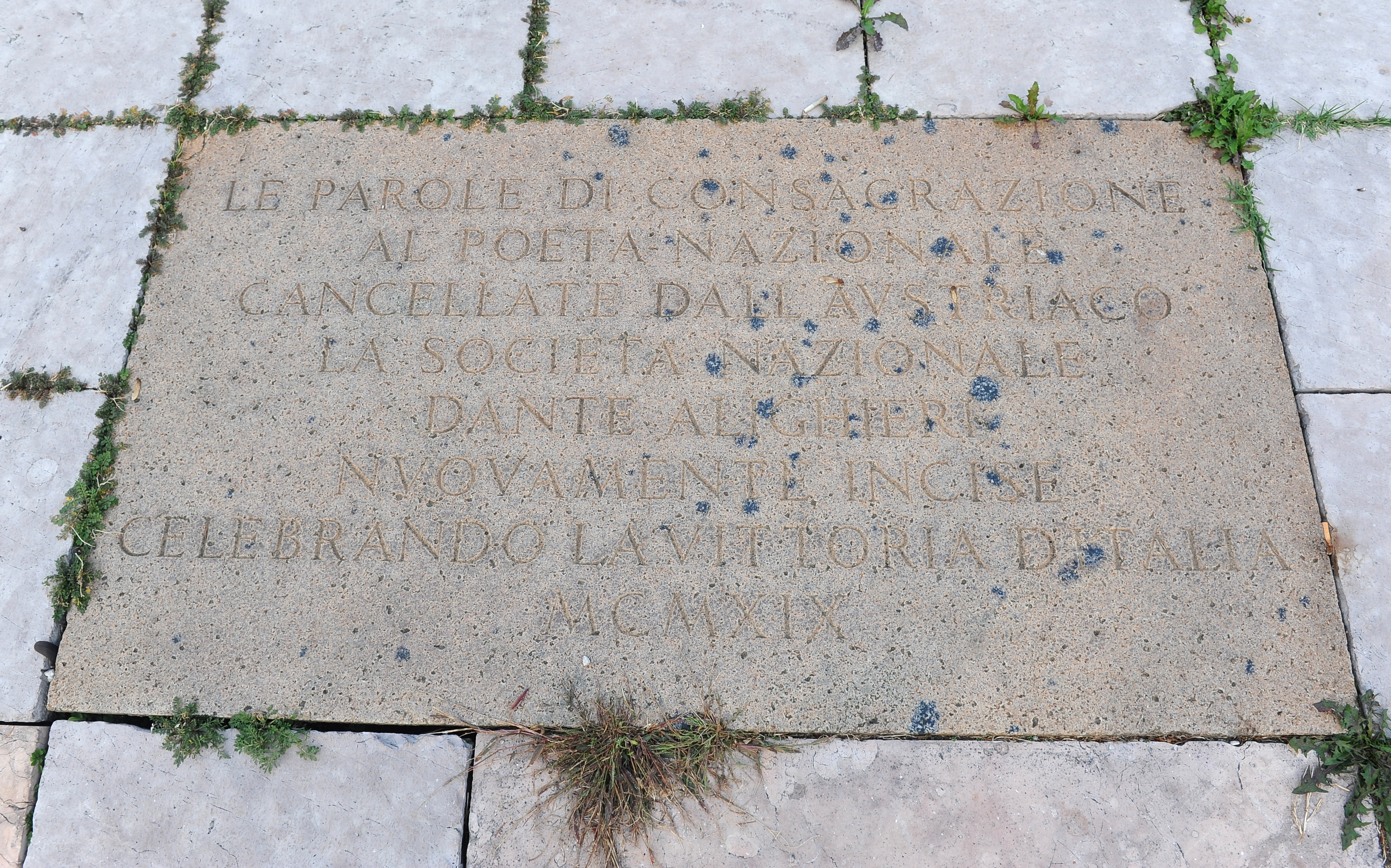 Monumento a Dante Alighieri. This is a photo of a monument which is part of cultural heritage of Italy.